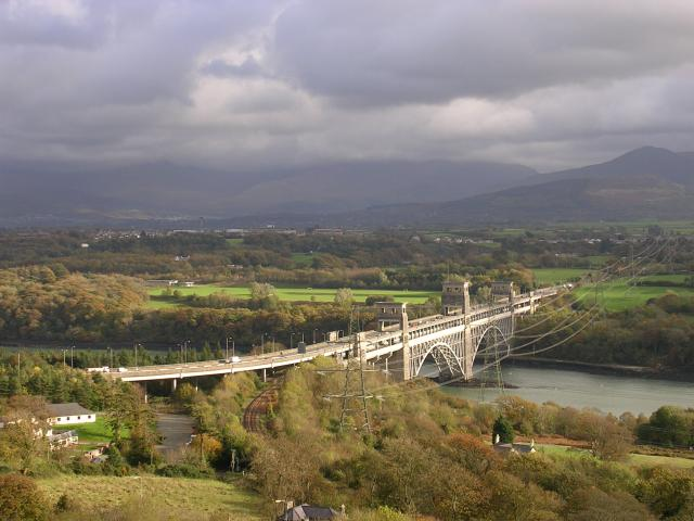 Pont Britannia